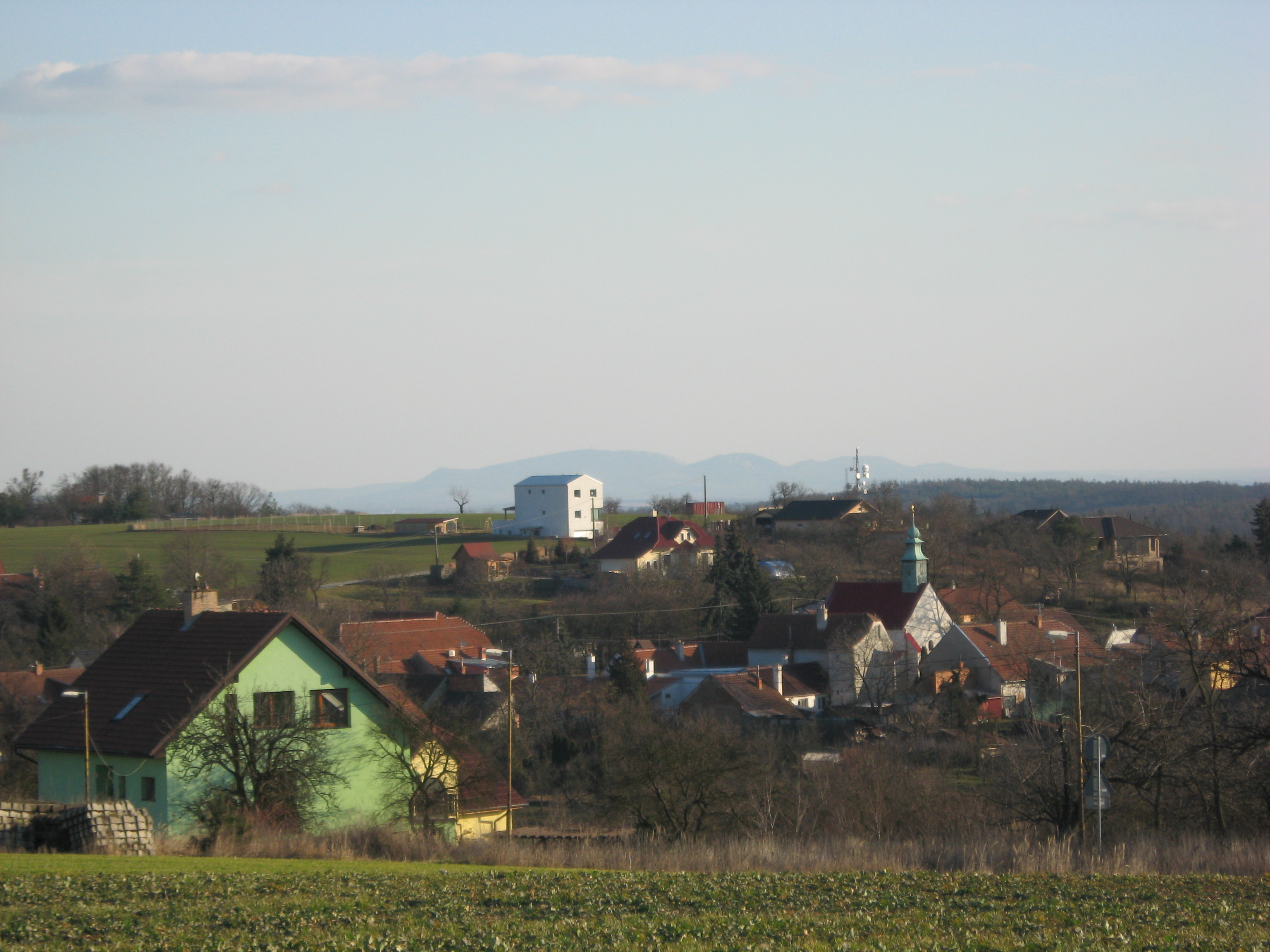 Omice - pohled od Hvízdalky. V dálce Pálava